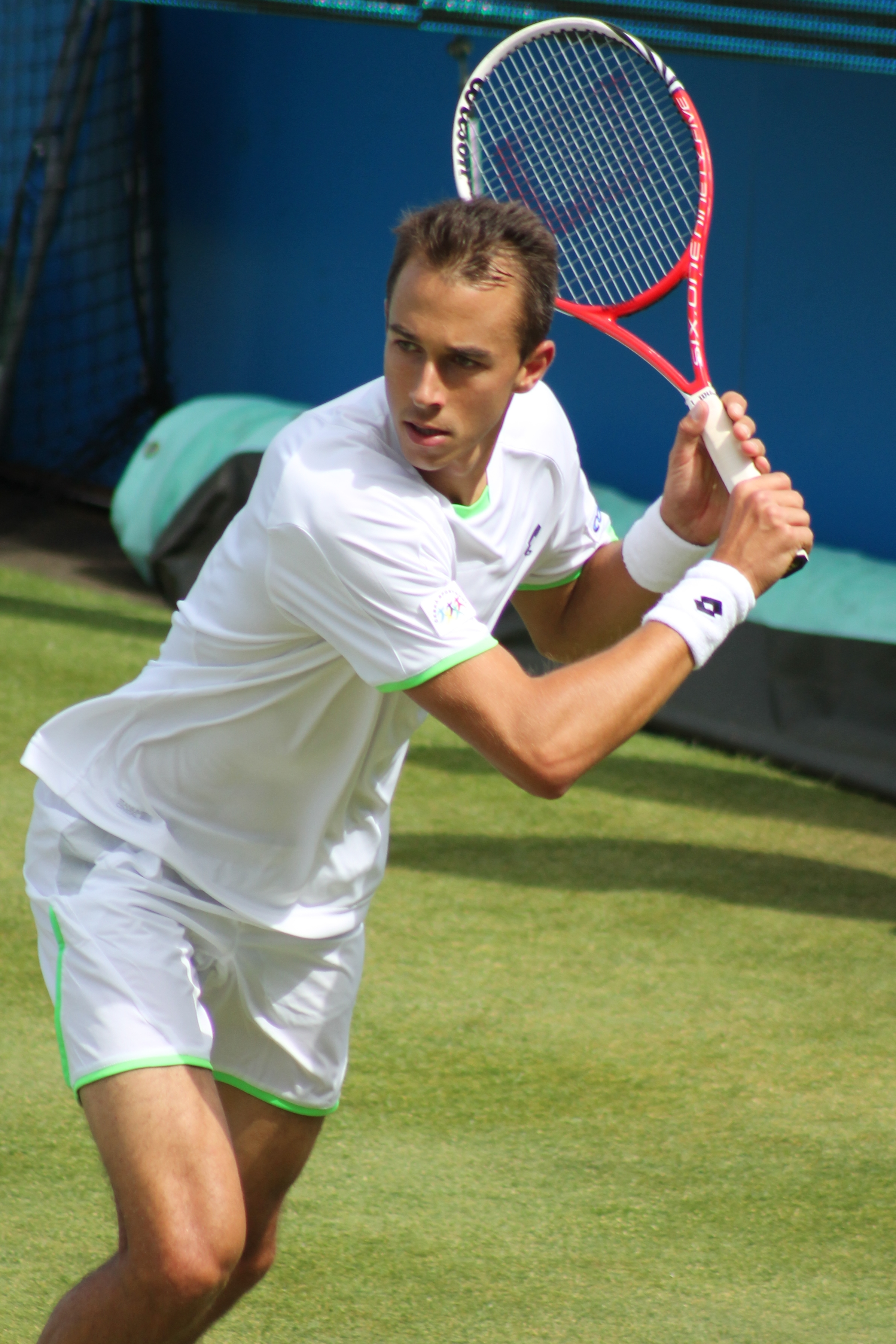 Rosol QC13-003